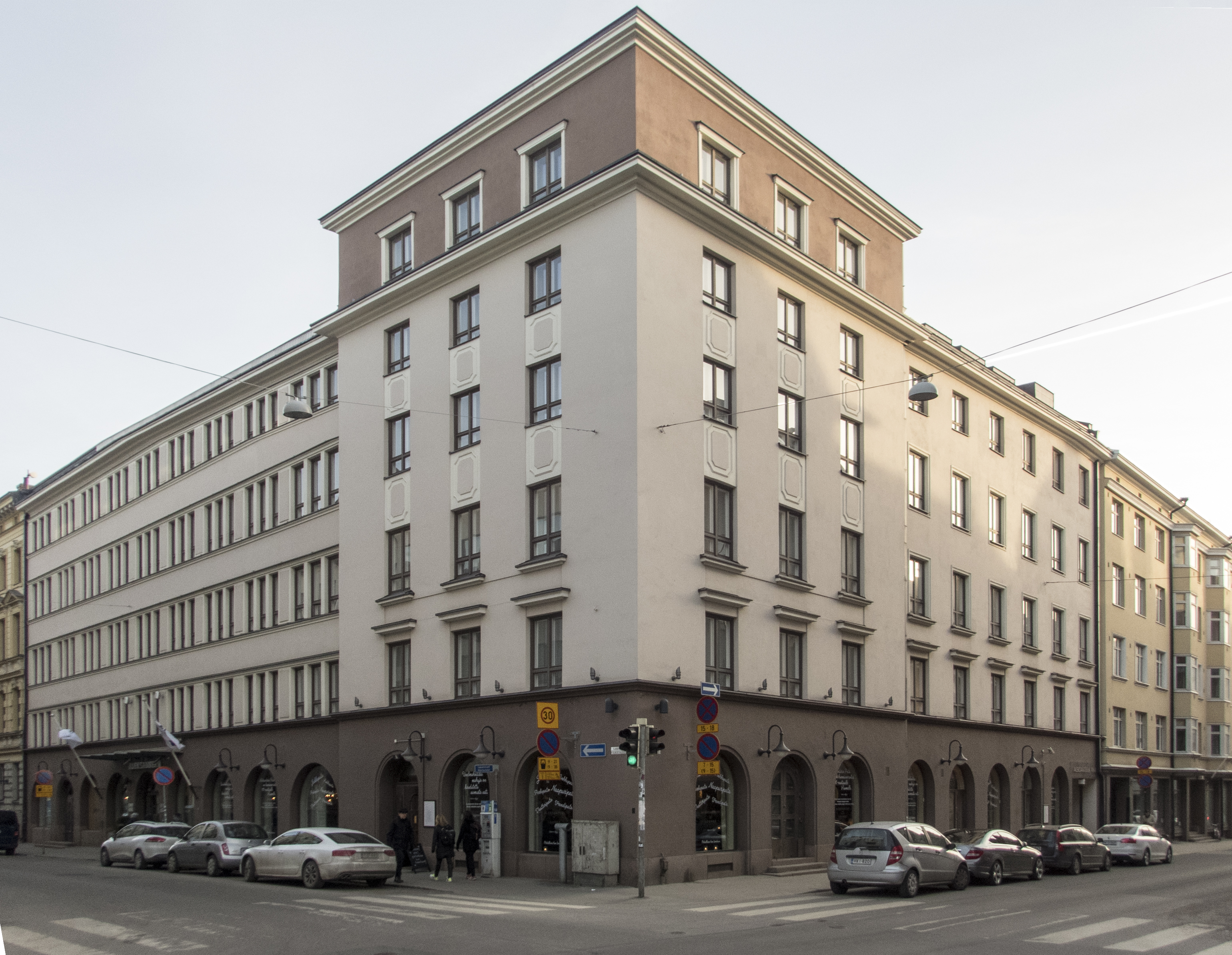 Albertinkatu 34 - Lönnrotinkatu 26, Helsinki. Built in 1929. Architect Vietti Nykänen